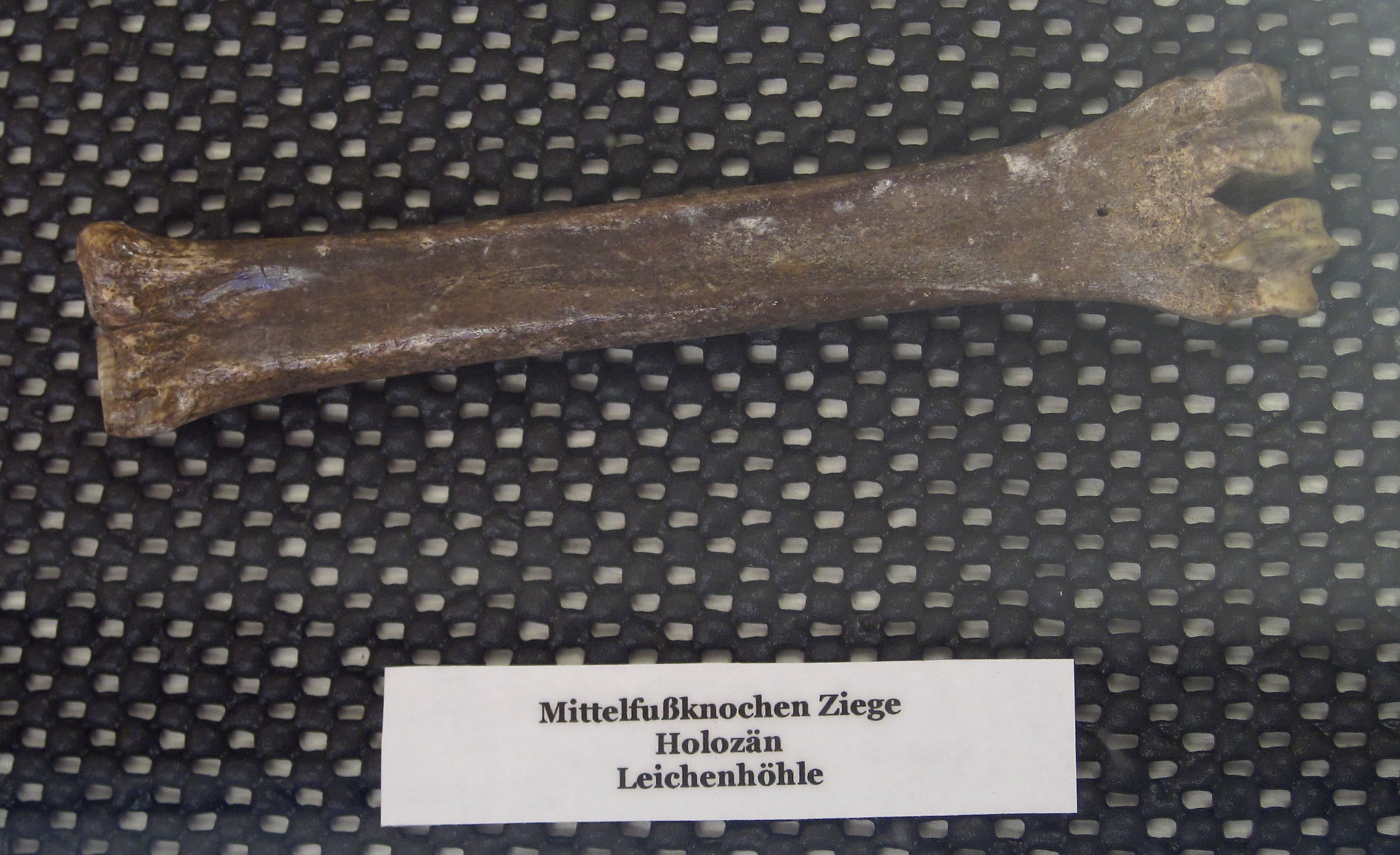 Mittelfußknochen einer Ziege aus dem Holozön. Fundort: Leichenhöhle in Balve. Ausstellungsstück im Museum für Vor- und Frühgeschichte in Balve-Wocklum.